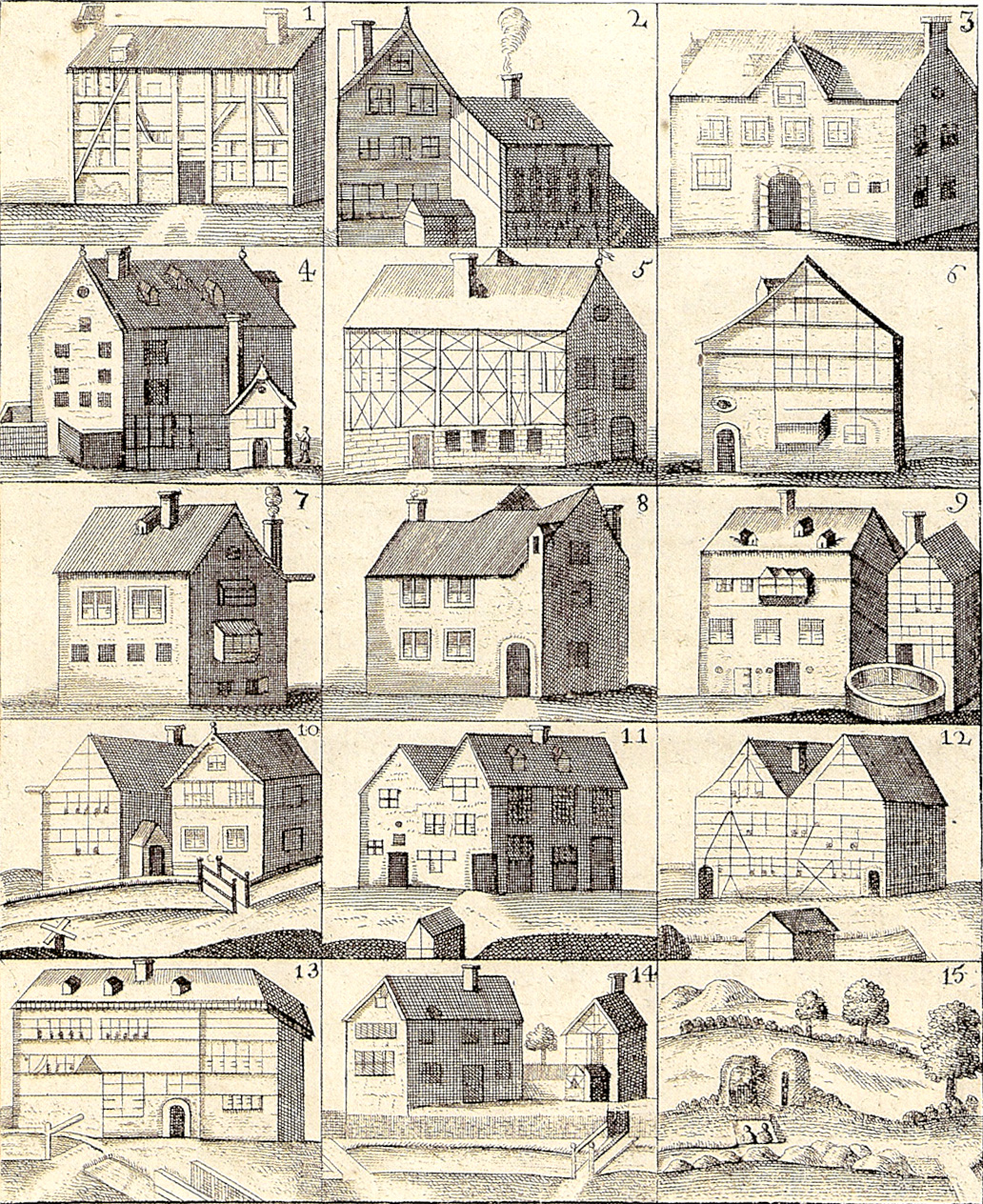 Kupferstich der Burtscheider Badehäuser Ende des 17. / Anfang des 18. Jahrhunderts von Franciscus Blondel